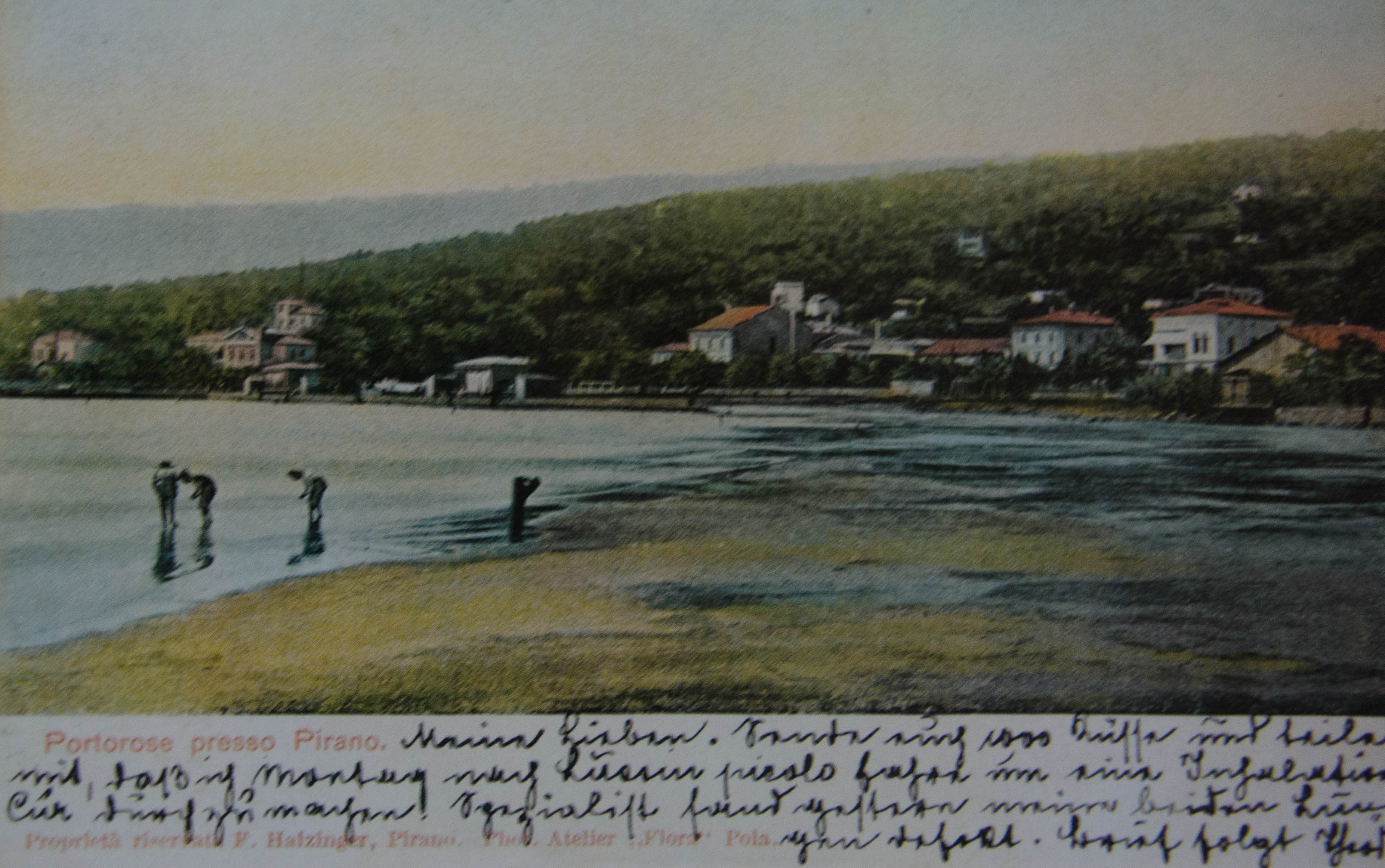 Razglednica Portoroža.